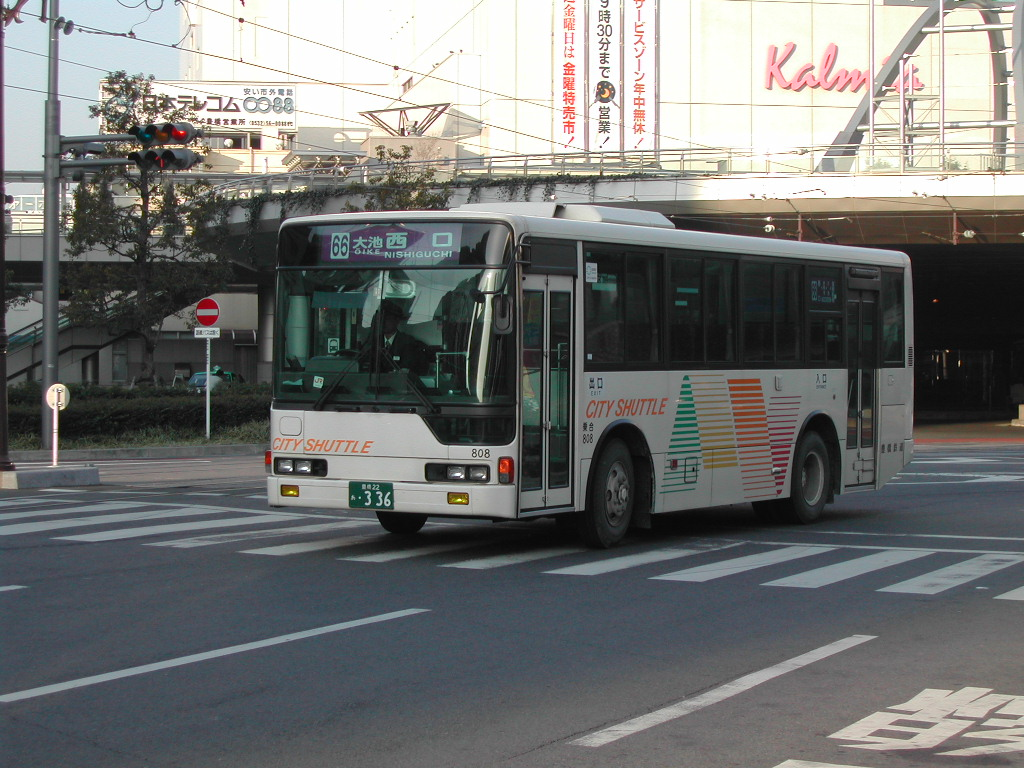 豊橋駅前にて 2002-3-10撮影